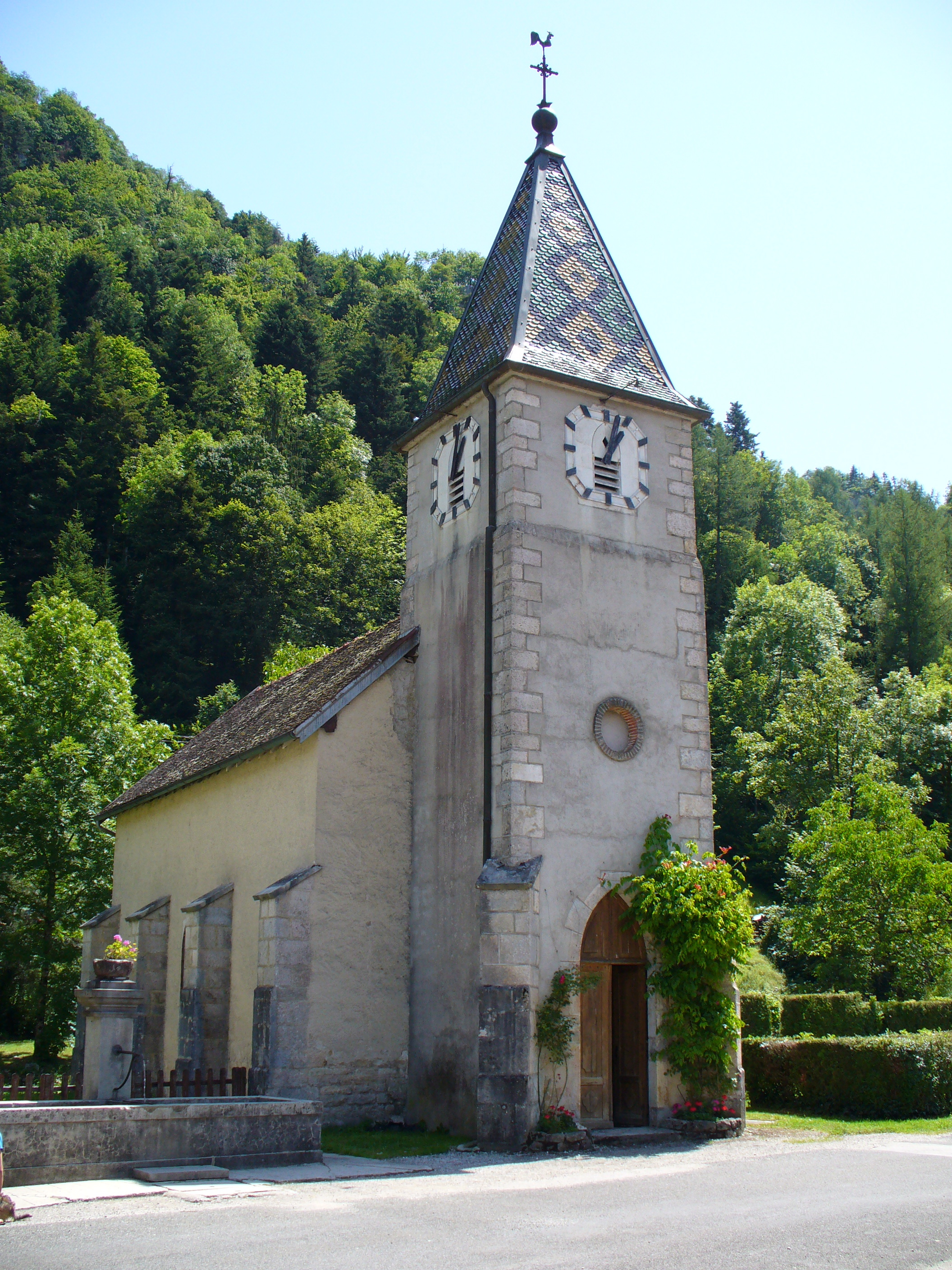 Eglise de La Frasnée (département du Jura, France)